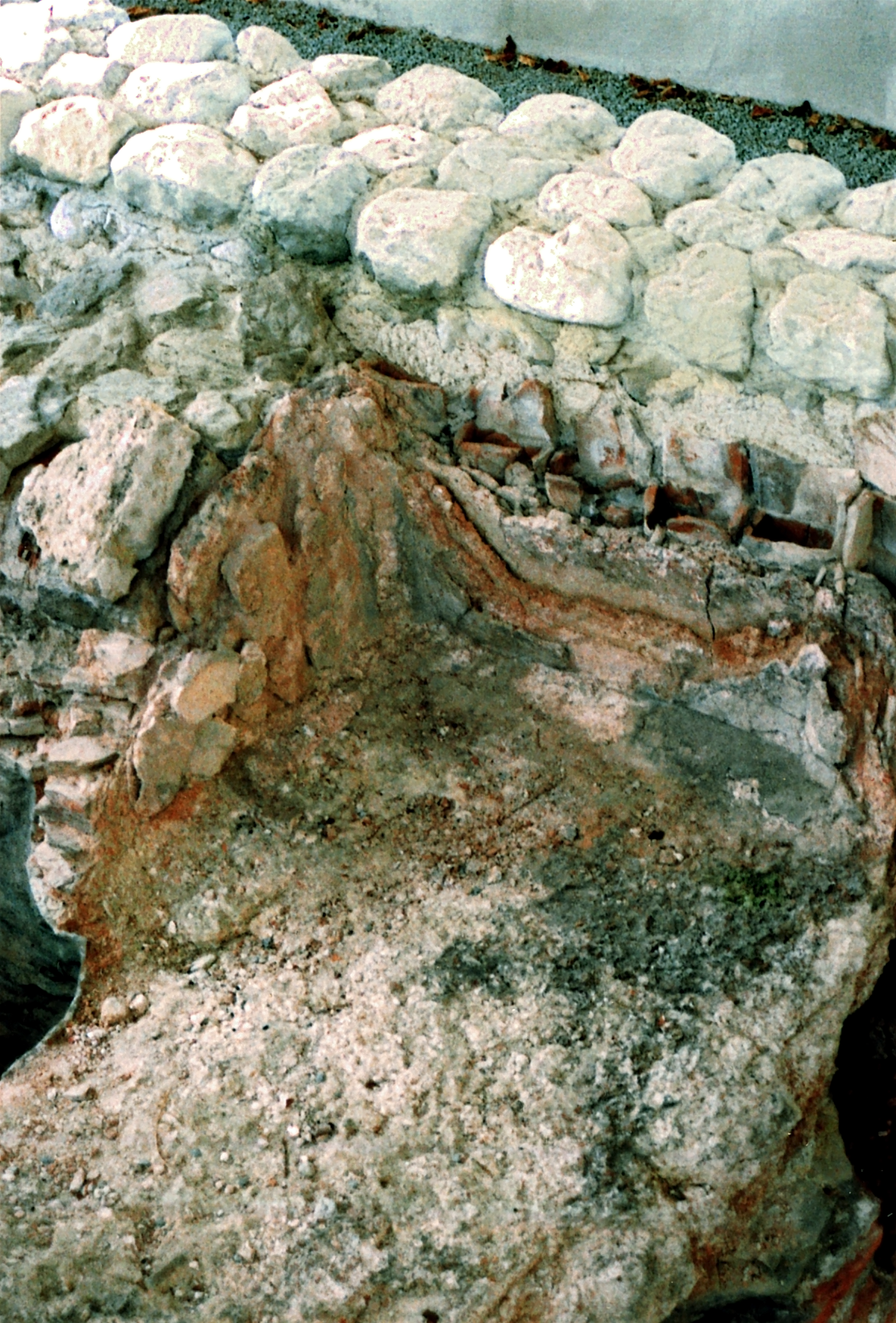 Römersiedlung Tegelberg, Haus 3, Detail der Heißwasserwanne. Dahinter befand sich das Praefurnium. Aufgenommen am Donnerstag, 16. Juli 2015. Der teilweise erkennbare rote Fugenstrich an den Mauern zeigt den sehr guten Erhaltungszustand, da nur der über dem Fugenstrich liegende Bereich wiederaufgemauert wurde.